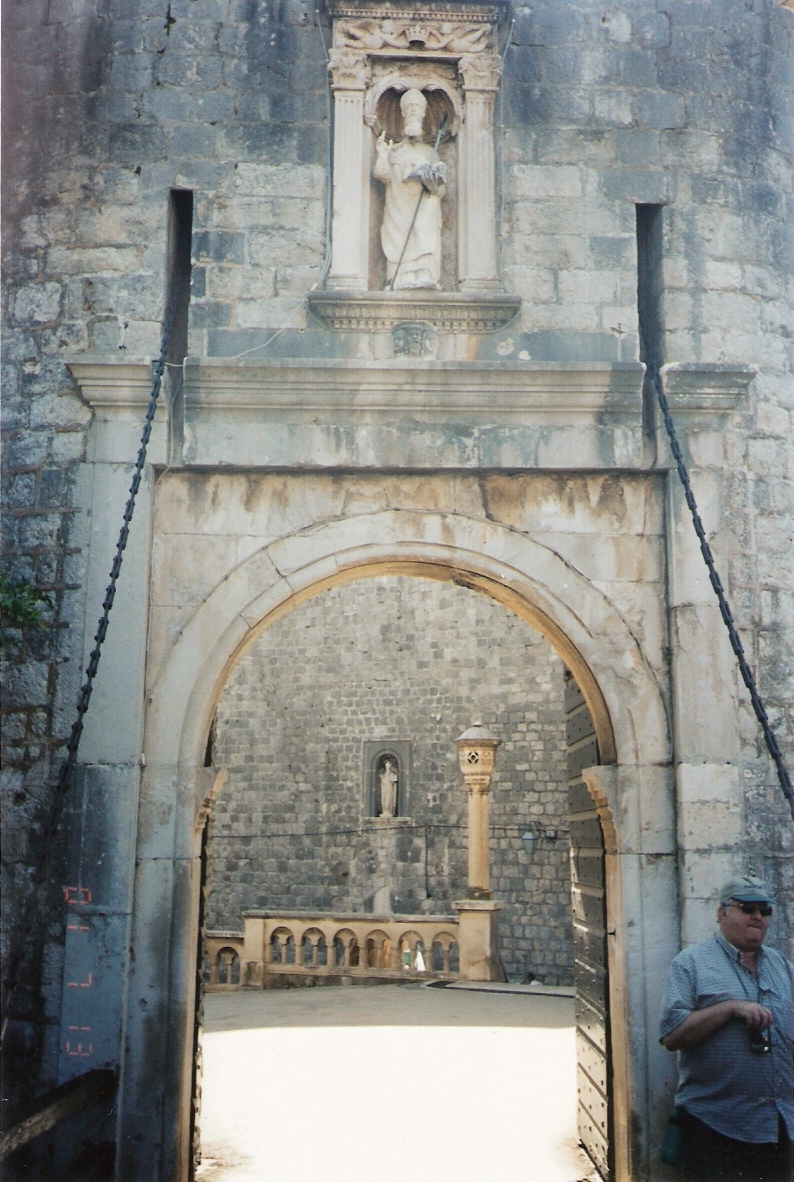 pile gate, dubrovnik